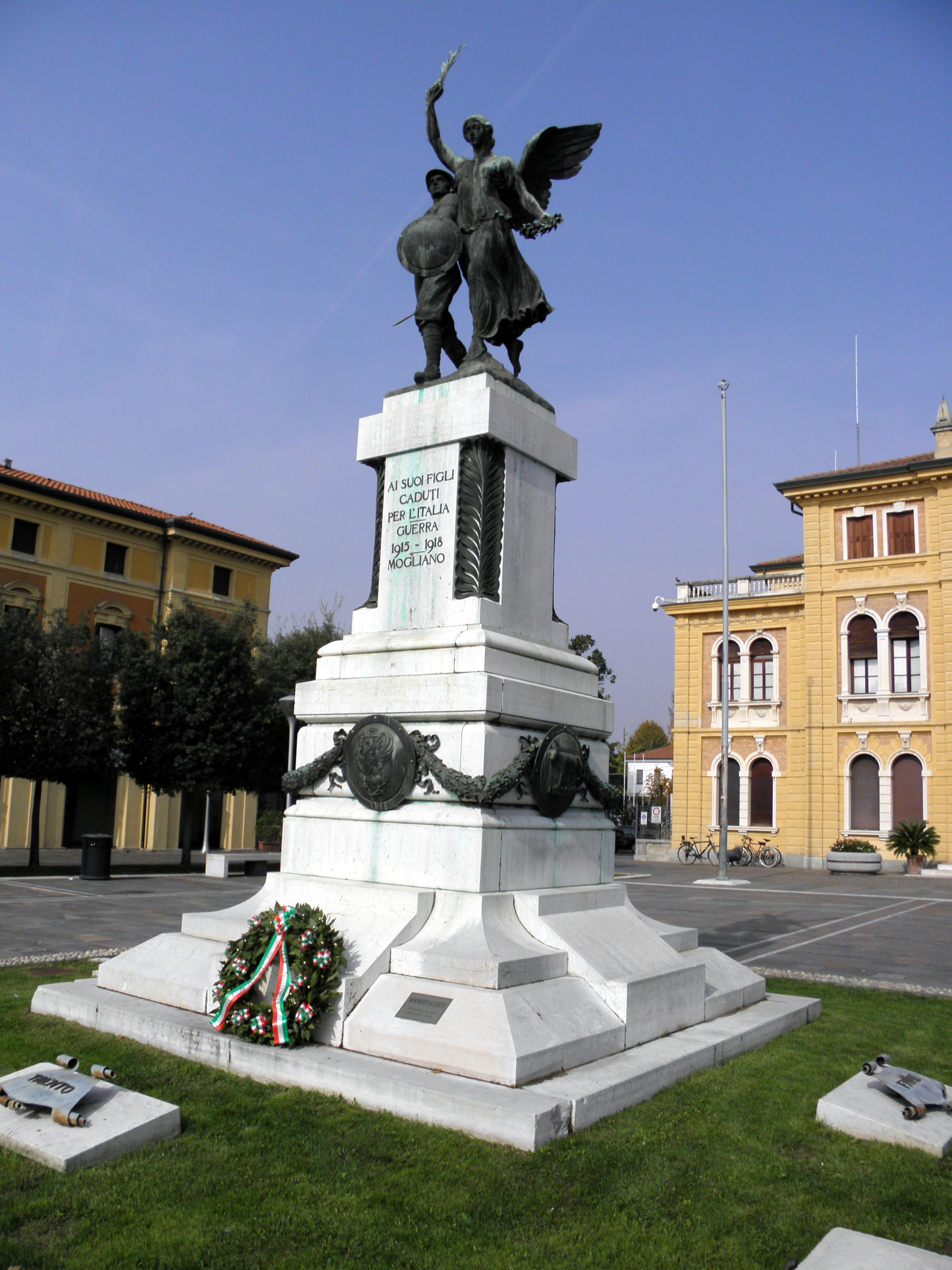 Mogliano Veneto, Piazza Caduti: il monumento ai caduti.